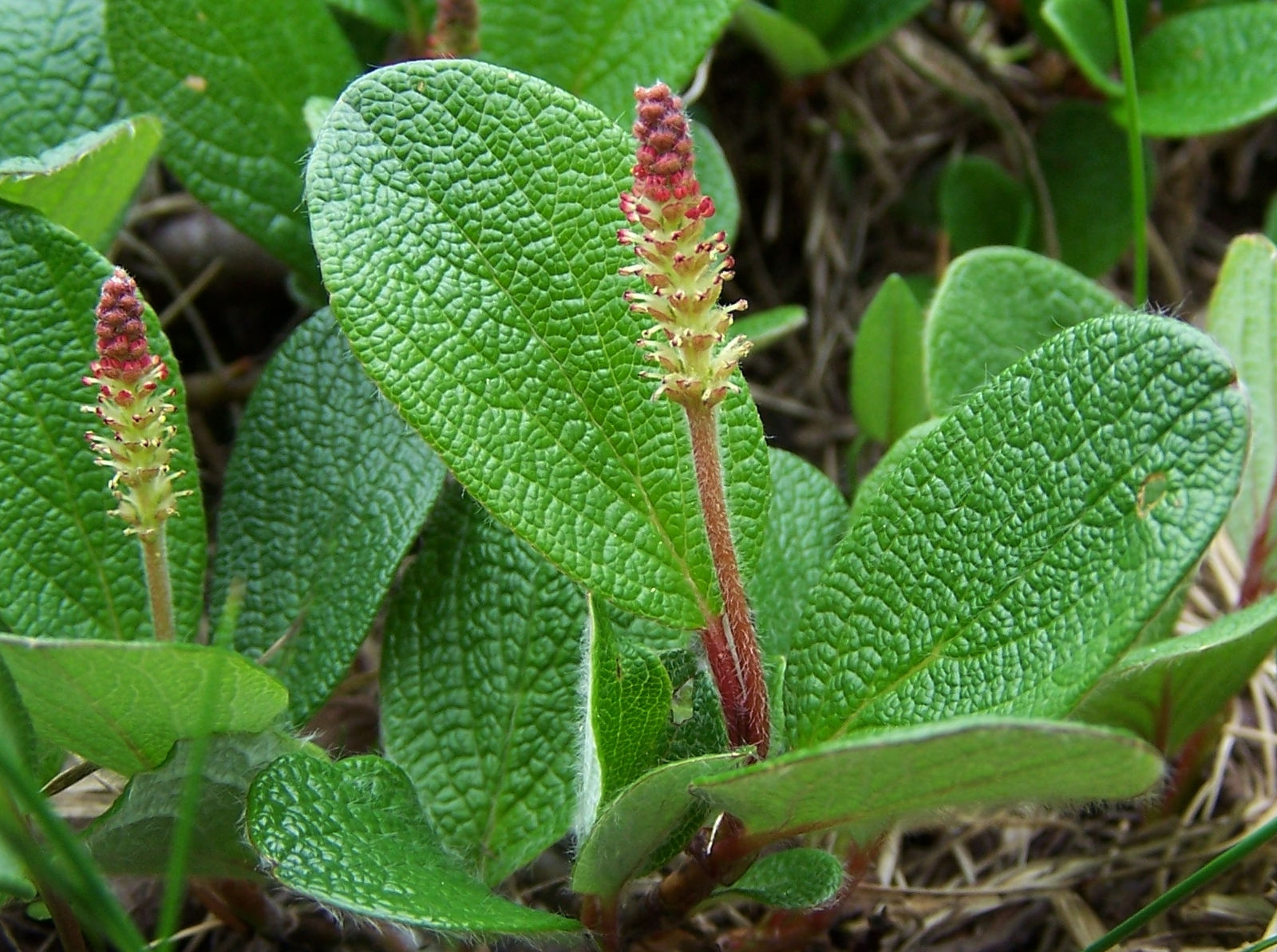 Salix reticulata (Tatra Mountains, Hala Upłaz)